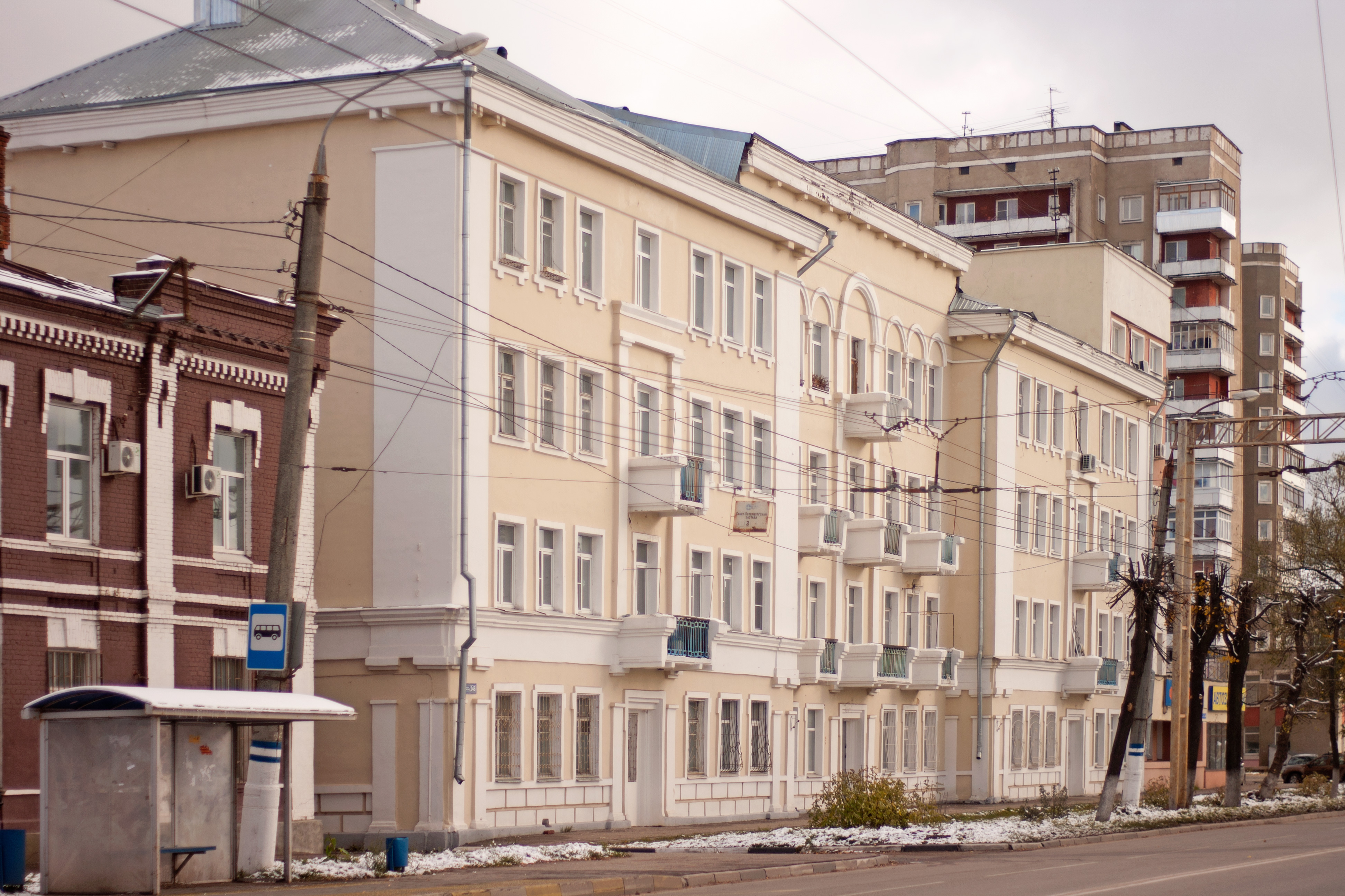 Афанасия Никитина наб., 148)